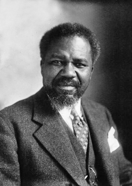 Candace, député (Guadeloupe) : photographie de presse